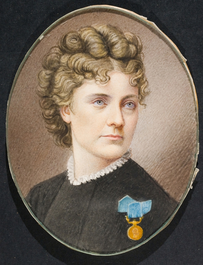 Elise Hwasser. Miniatyrmålning. Porträtt. Elfenben. Gouache.